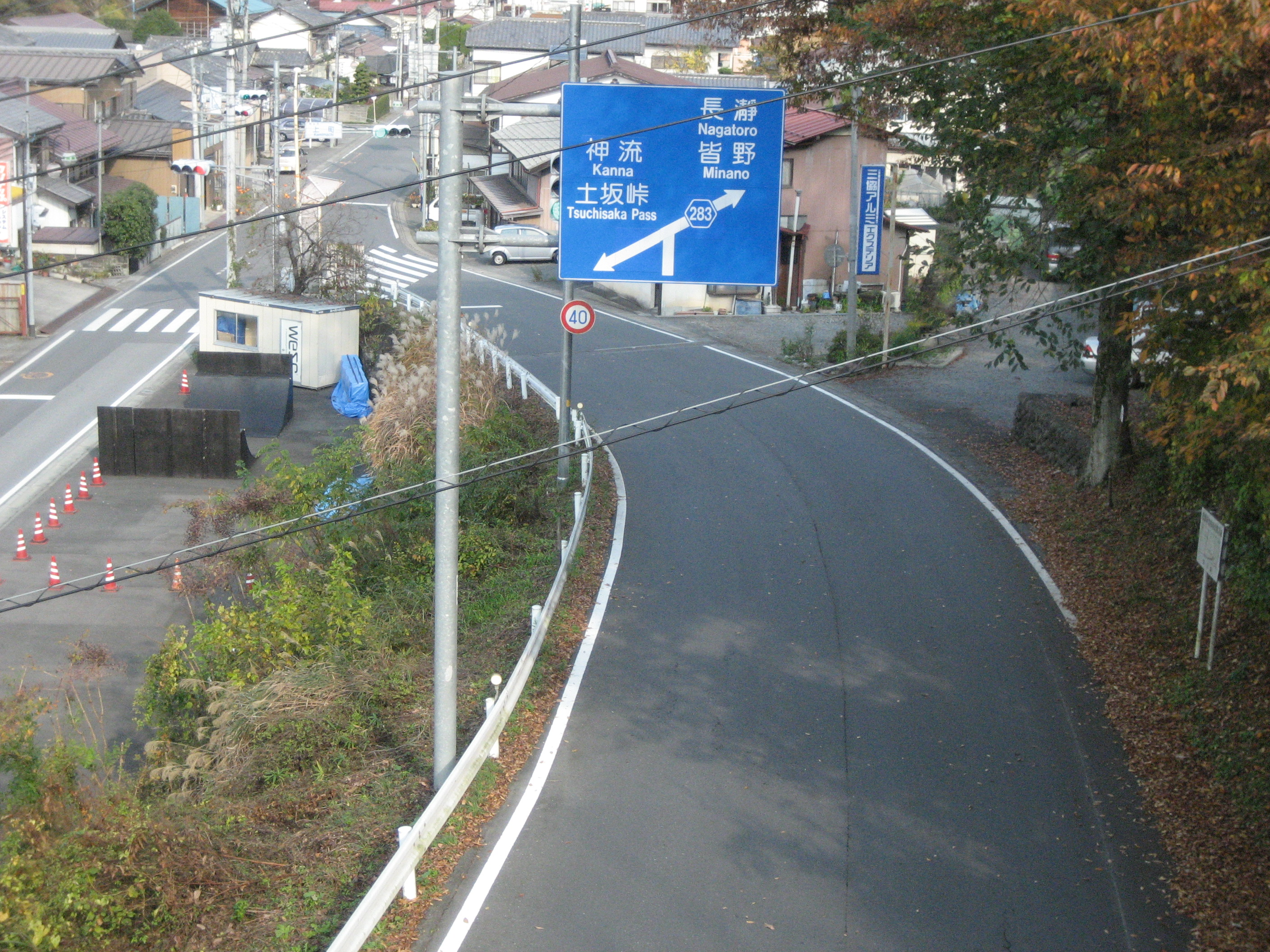 埼玉県道283号線秩父市下吉田上町交差点付近